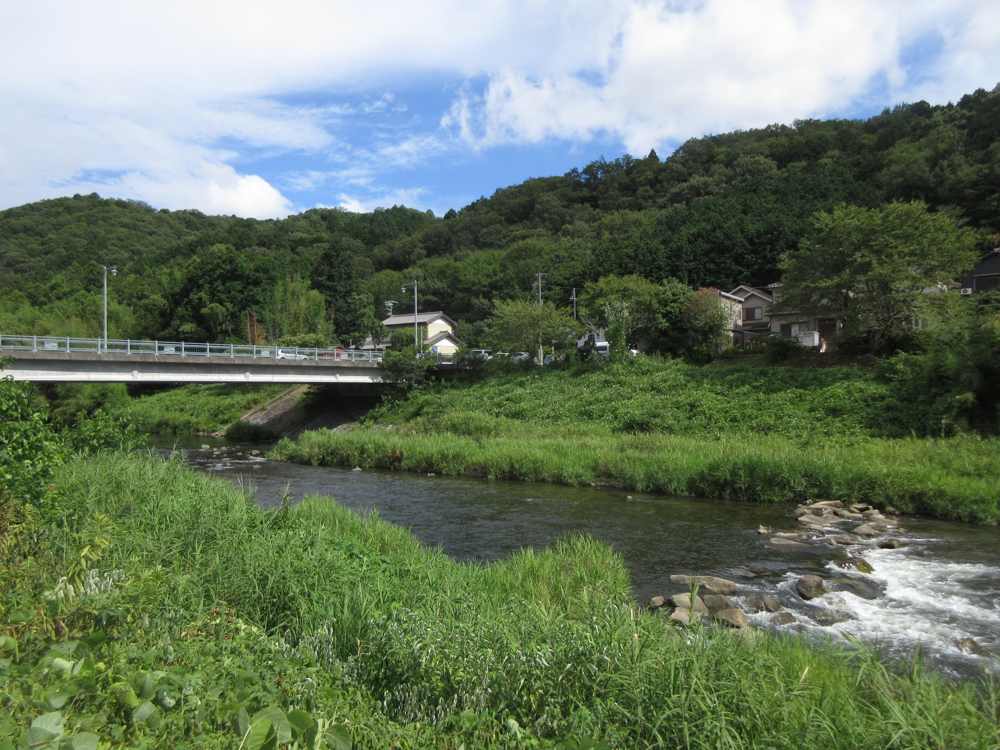 乙川（保母町、小美町）